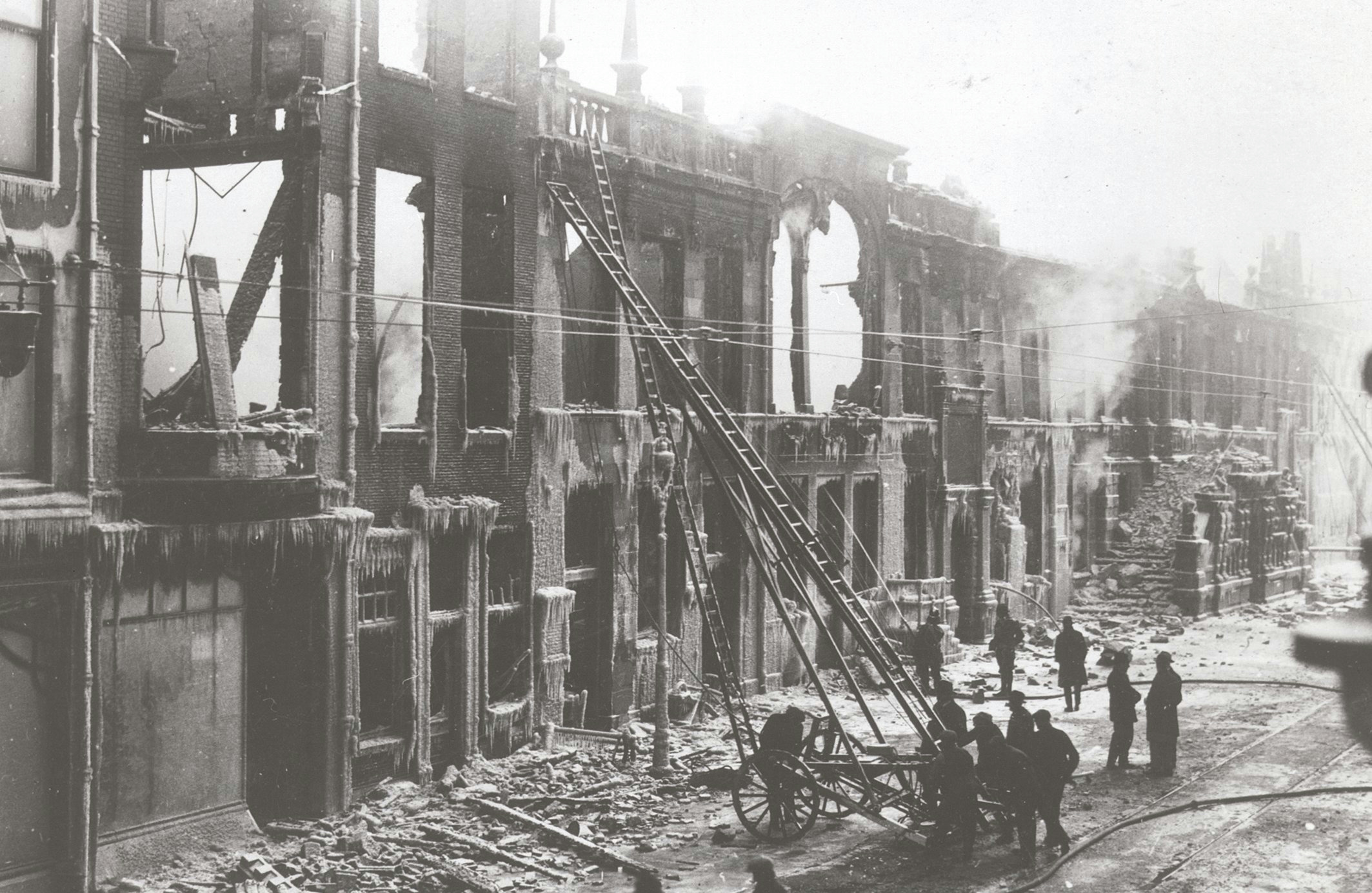 STADHUIS: Exterieur OVERZICHT VOORGEVEL (TIJDENS DE BRAND, FEBRUARI 1929)